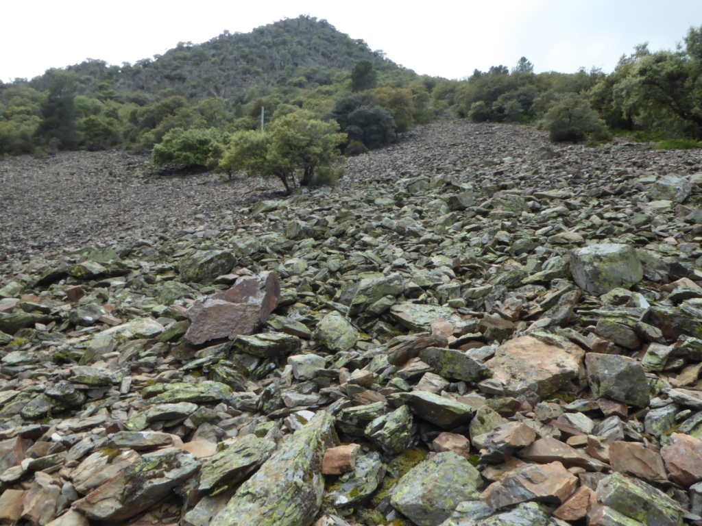 Volcán